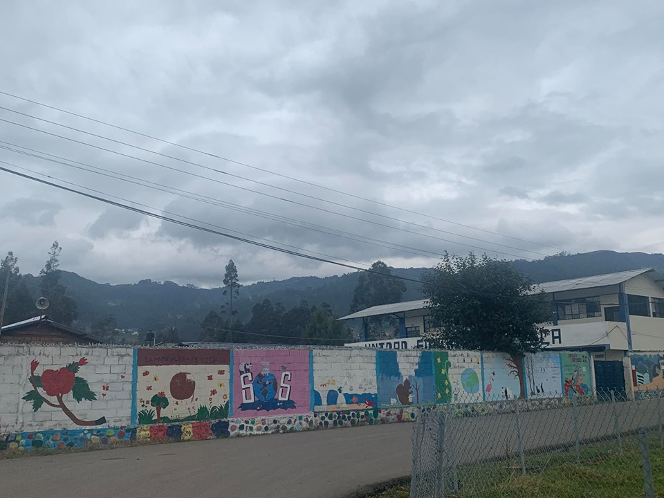 Unidad Educativa Checa, ubicada en el Parroquia Checa